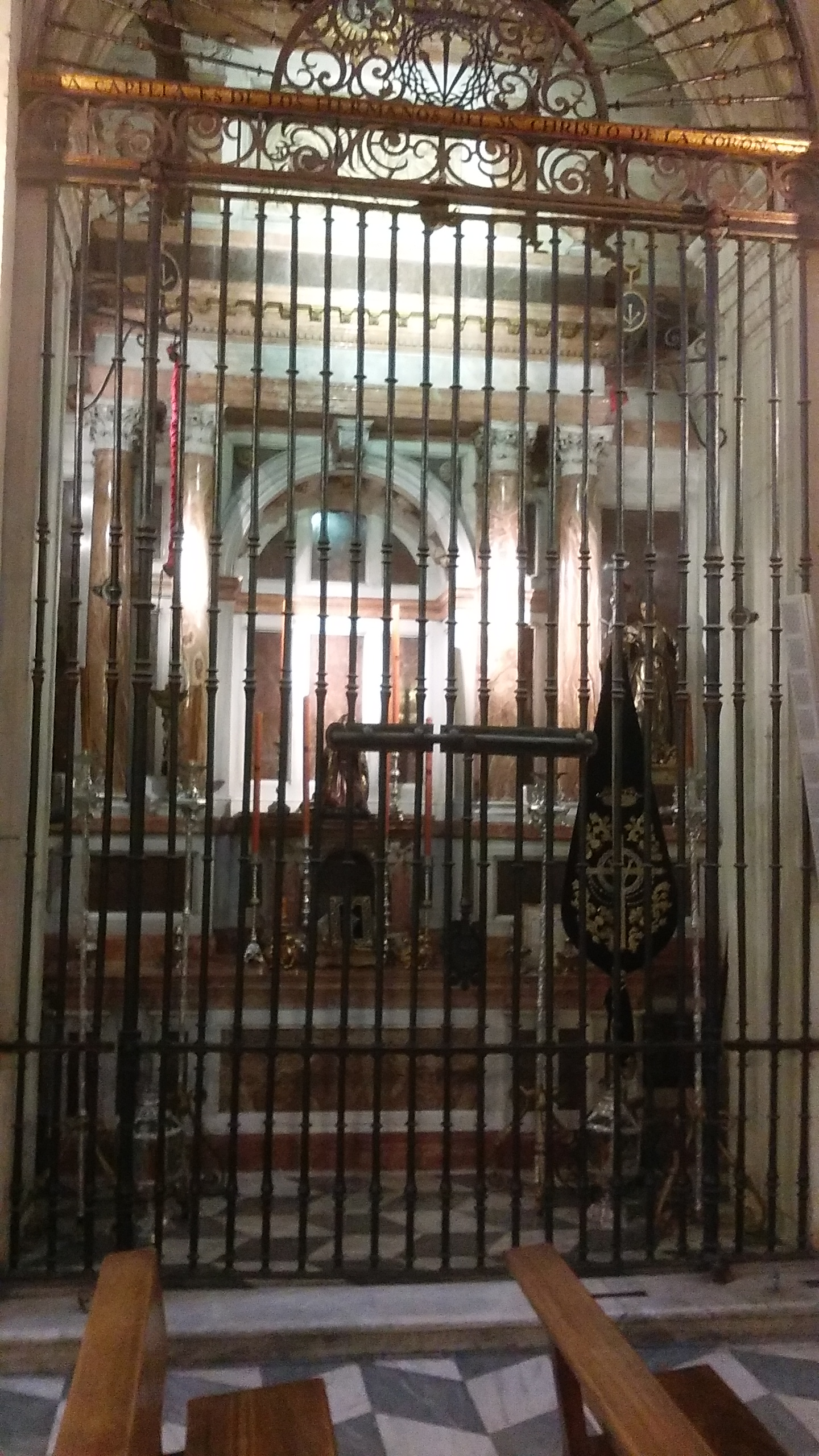 estandarte del Cristo de La Corona en Sevilla